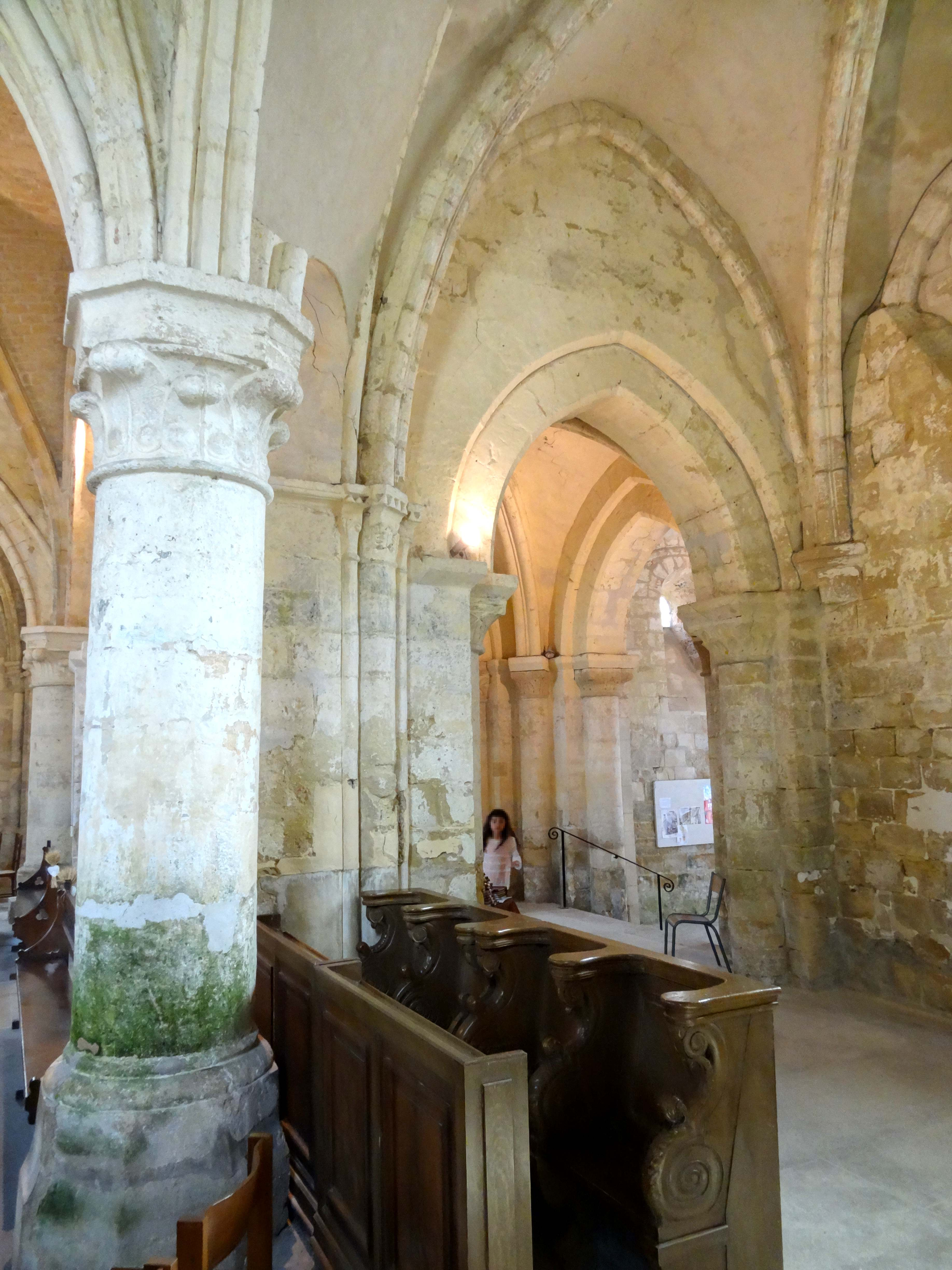 Intérieur de l'église - voir titre.